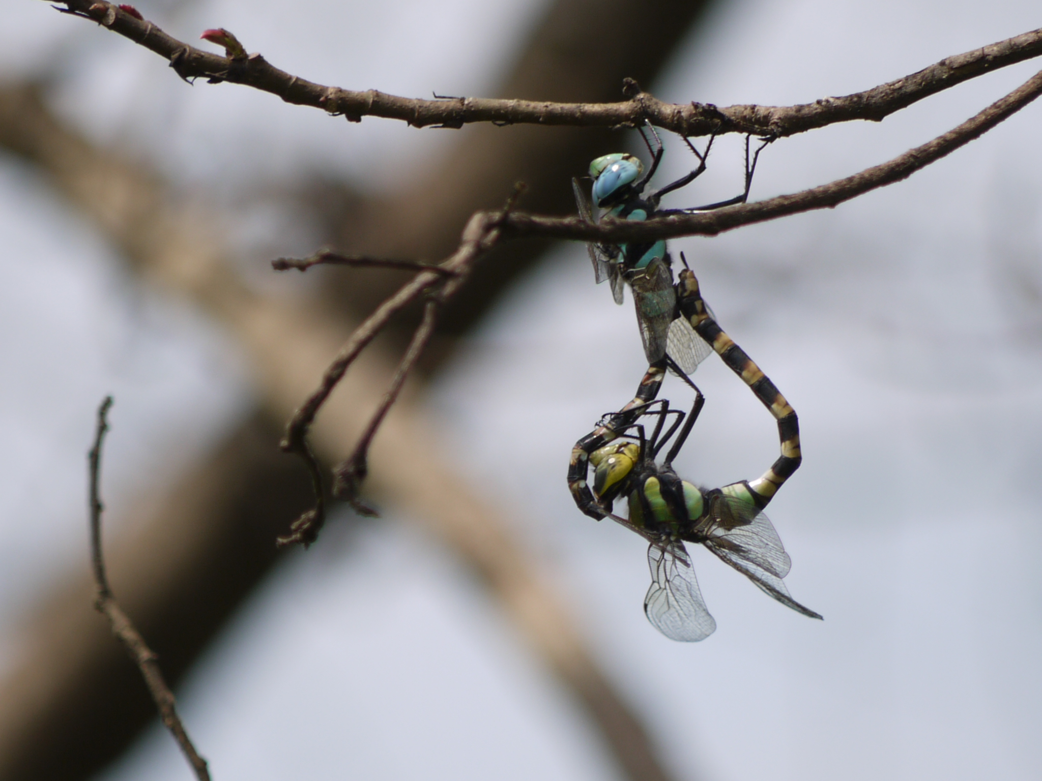 Anax immaculifrons